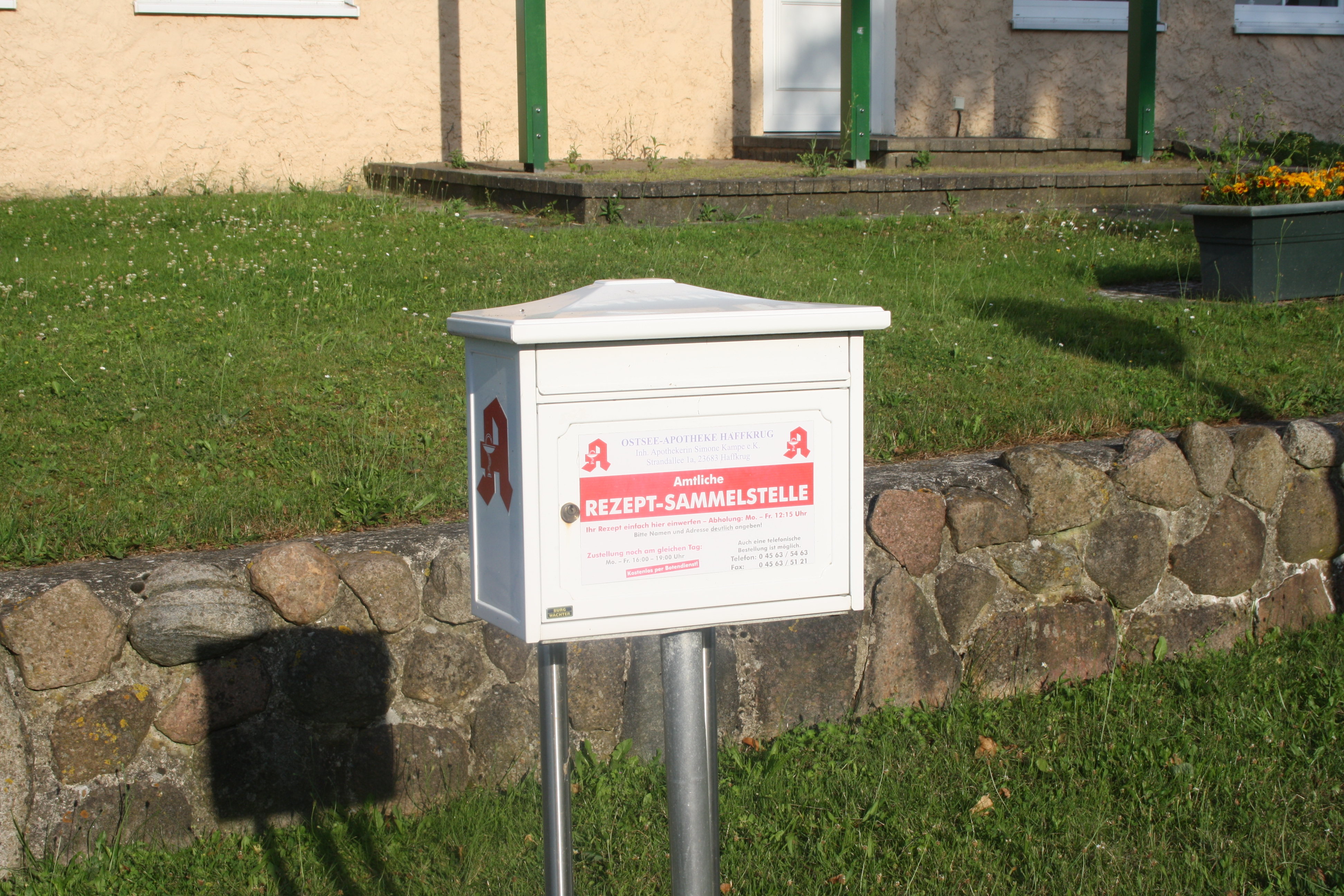 Rezeptbriefkasten in Süsel. Kreis Ostholstein